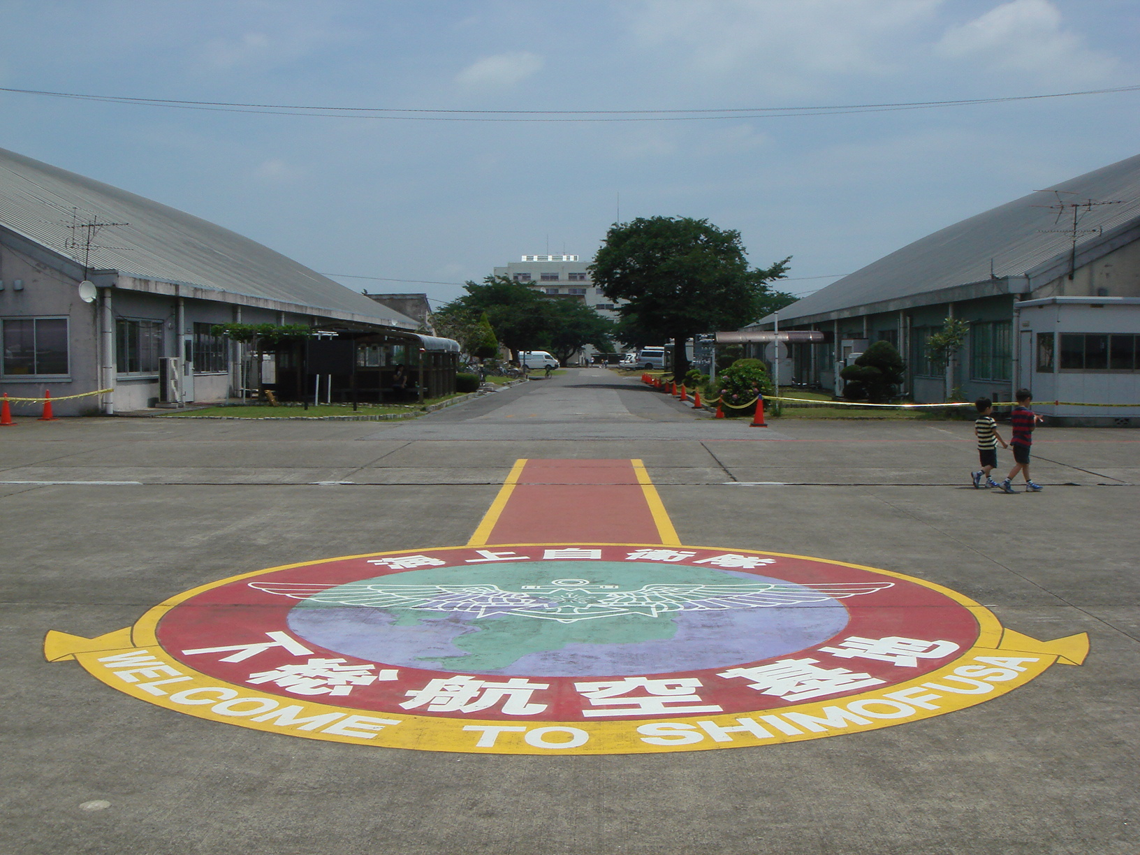 下総航空基地にて撮影